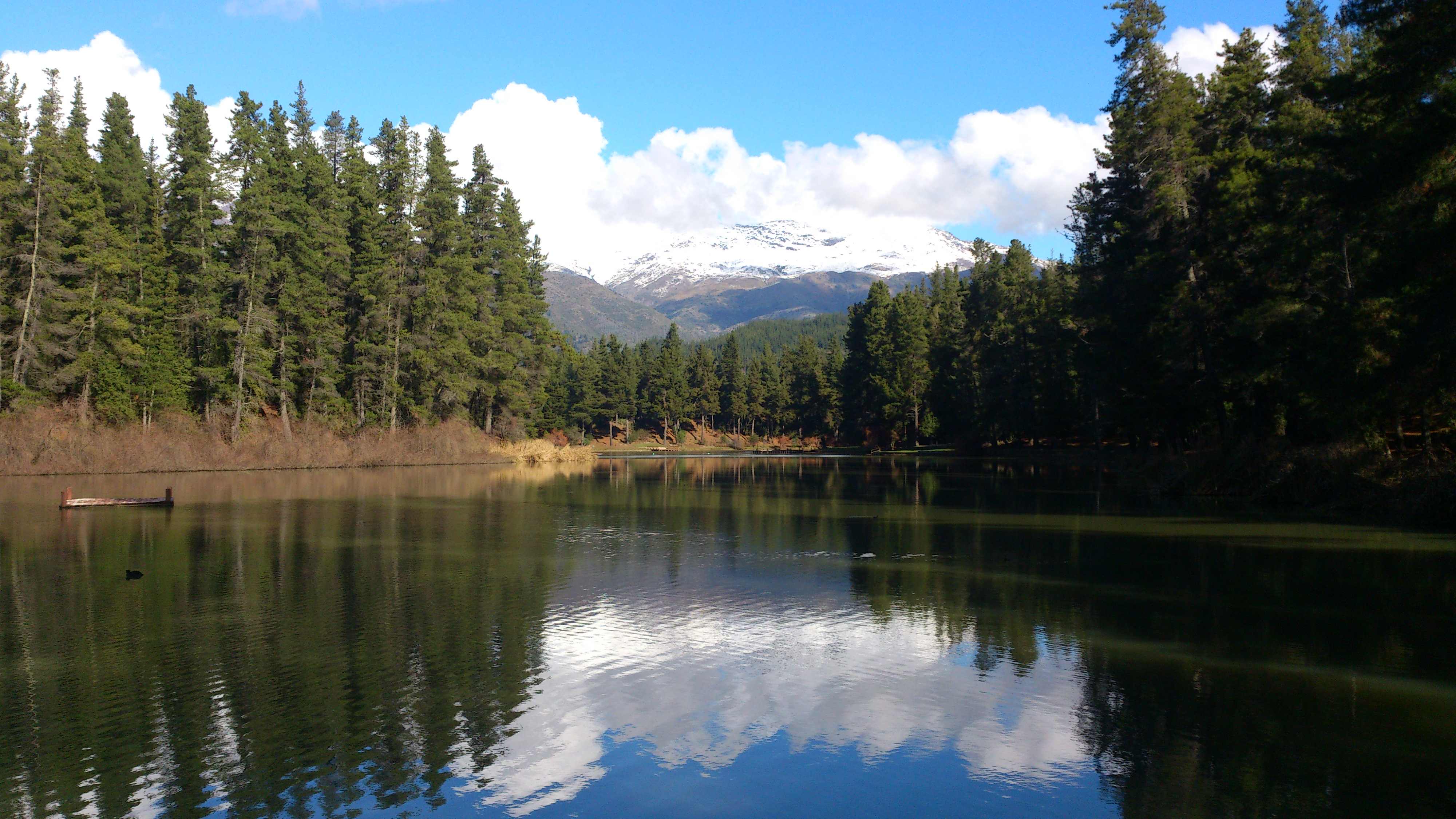 Laguna Ubicada en la Zona de las Sierras de Bellavista.